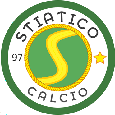 Emiliàn e rumagnòl: Insaggna dal Stiâtic Fùbbol 97, dsgnèda dal Liviojavi